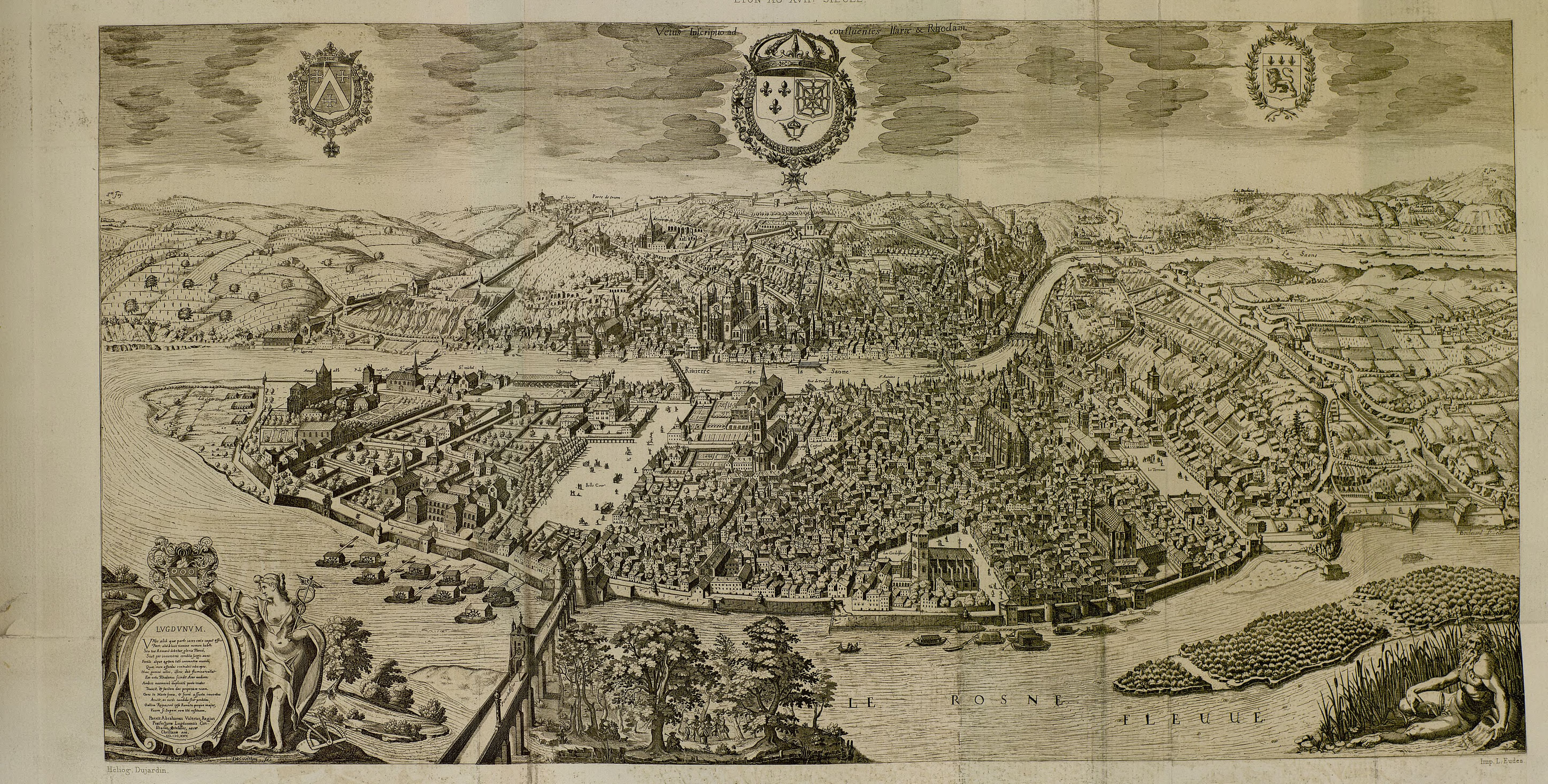 Illustration de l'ouvrage « Les anciens couvents de Lyon » (1895) par Adolphe Vachet . Gravure de 1625.